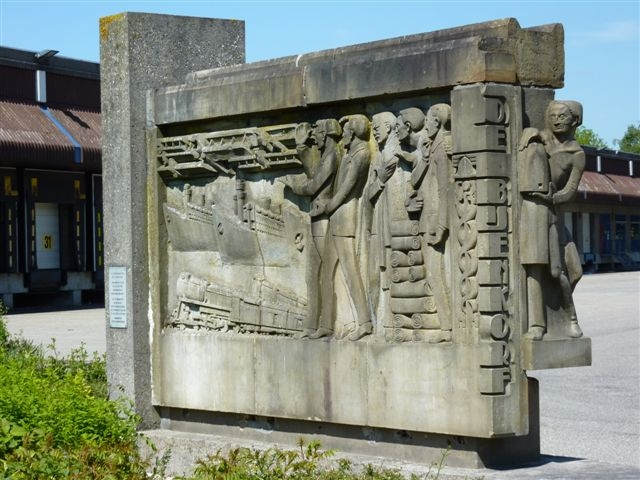 De Rotterdamse gevelsteen van H.A. van den Eynde (1930) bij het Distributiecentrum Woerden, De Bijenkorf